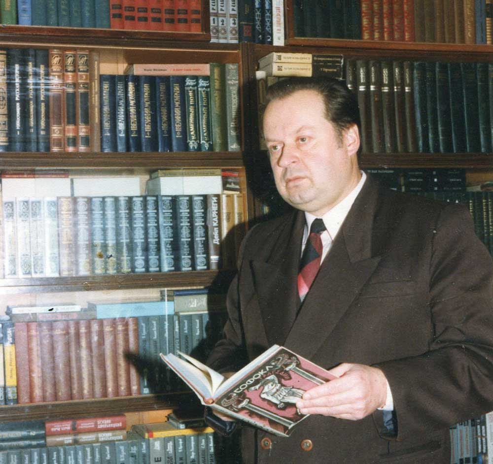 Віталій Леус